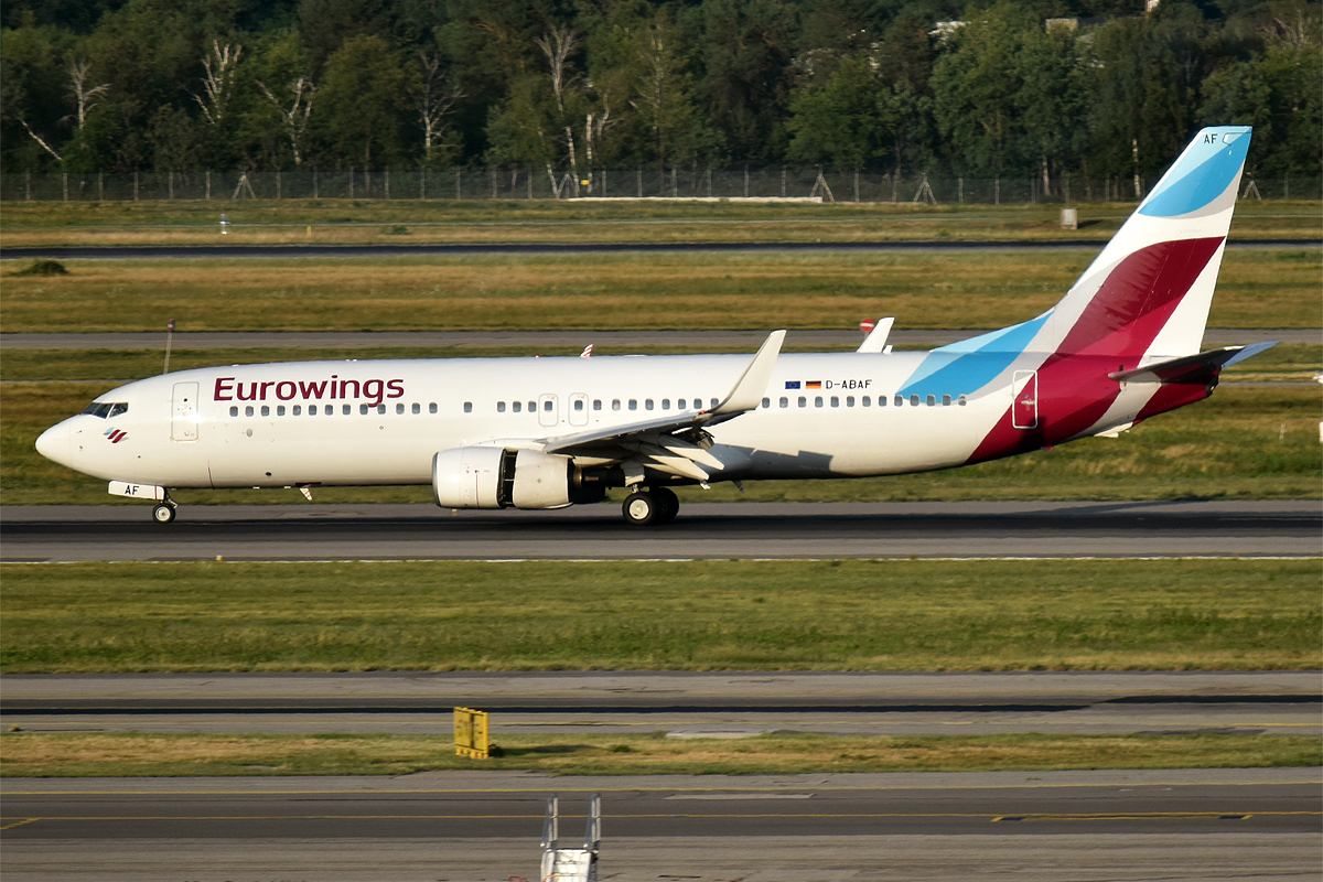 Eurowings, D-ABAF, Boeing 737-86J